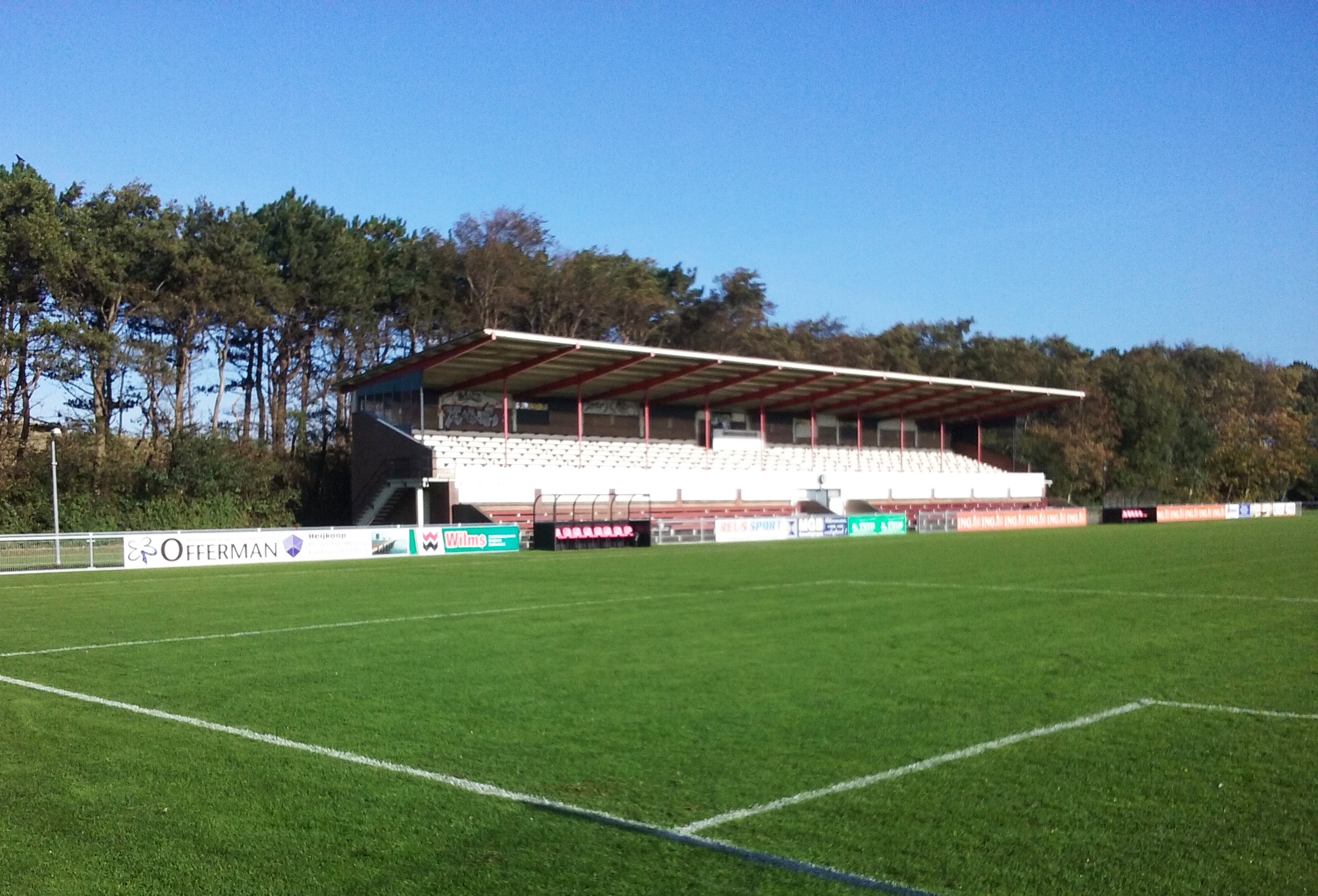 Sportpark De Streepjesberg in Den Helder (Nederland).